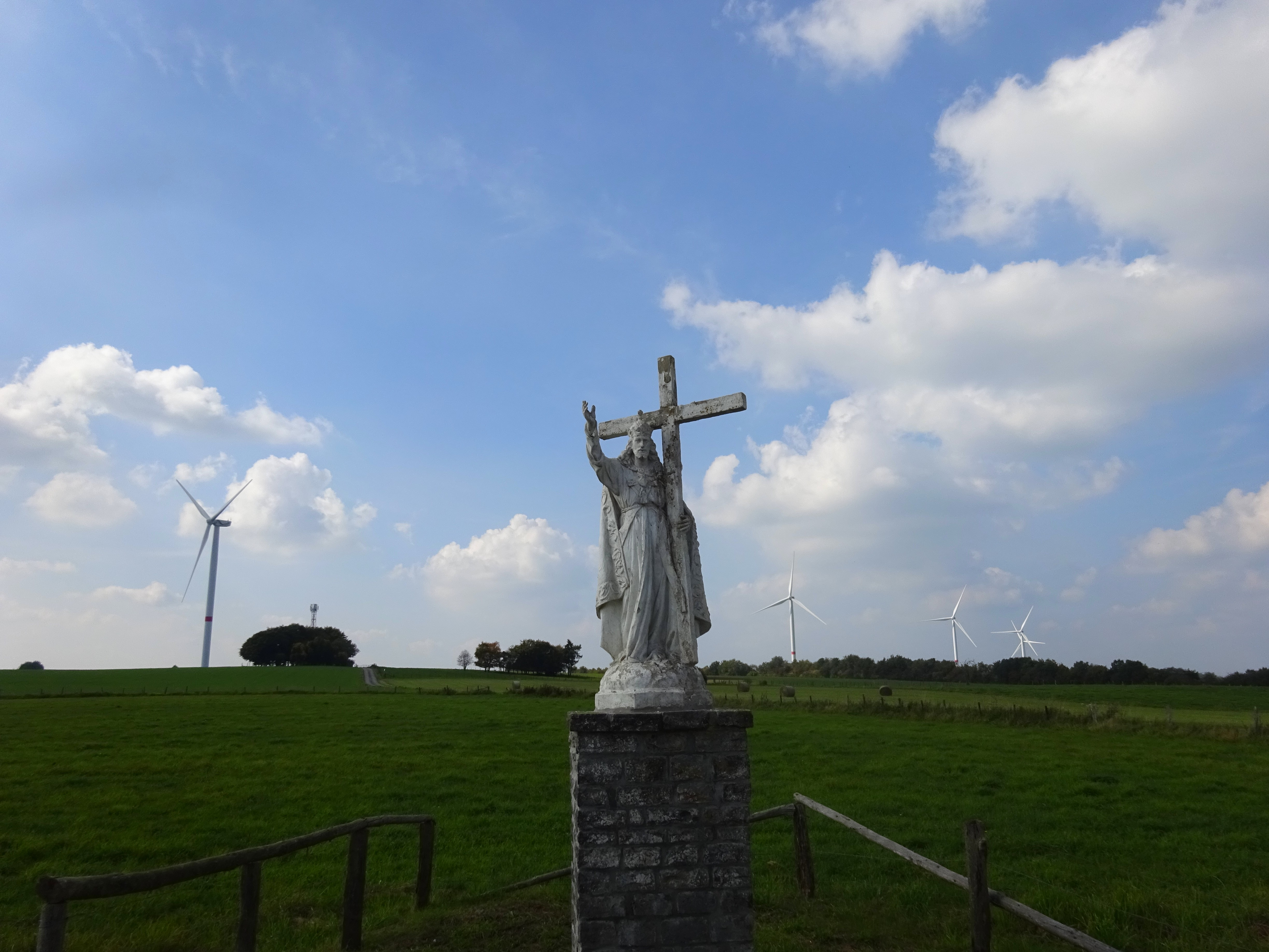 Calvaire entre Bourcy et Michamps